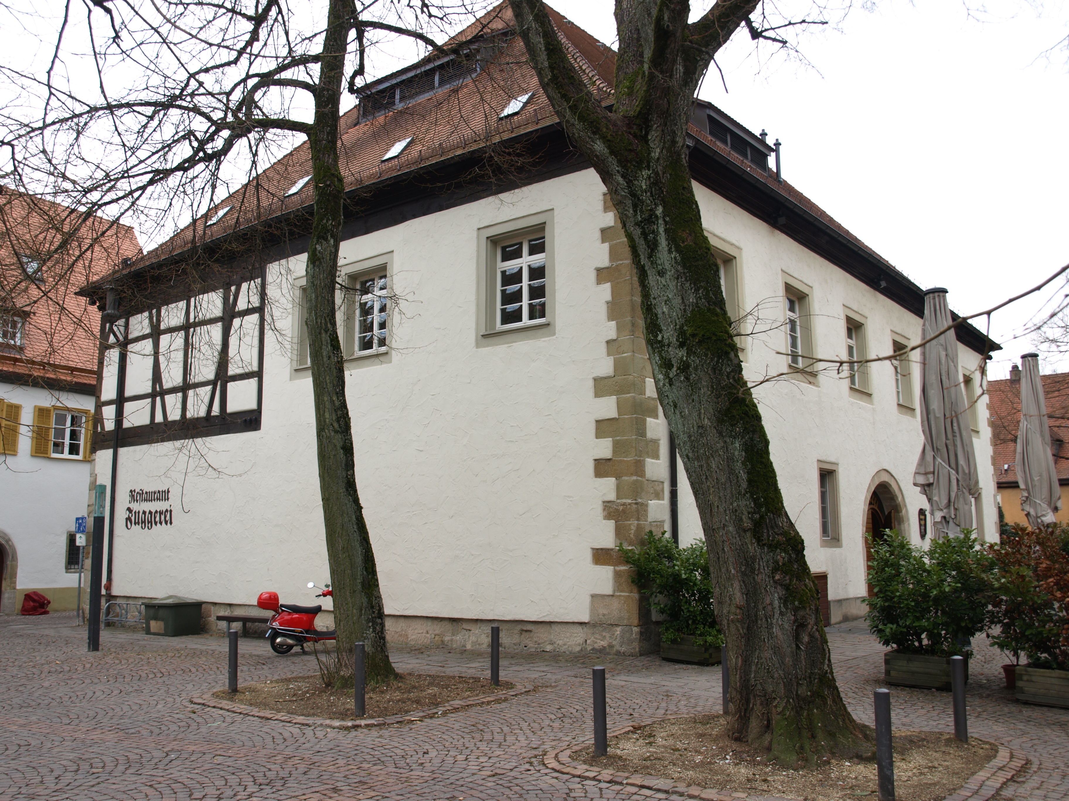 Fuggerei